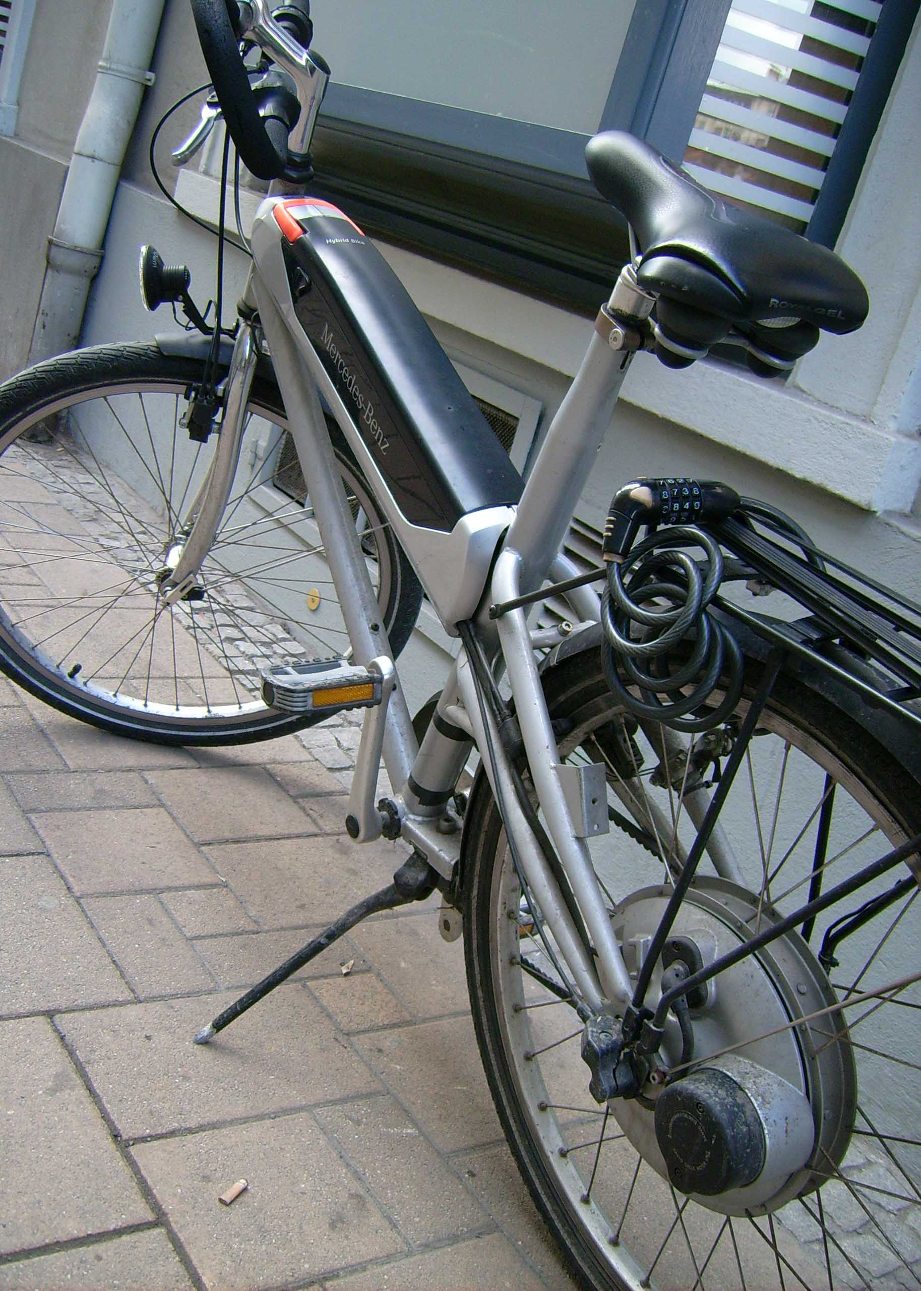 Eigens foto - vor der Firma Phote taken by myself in Graz.